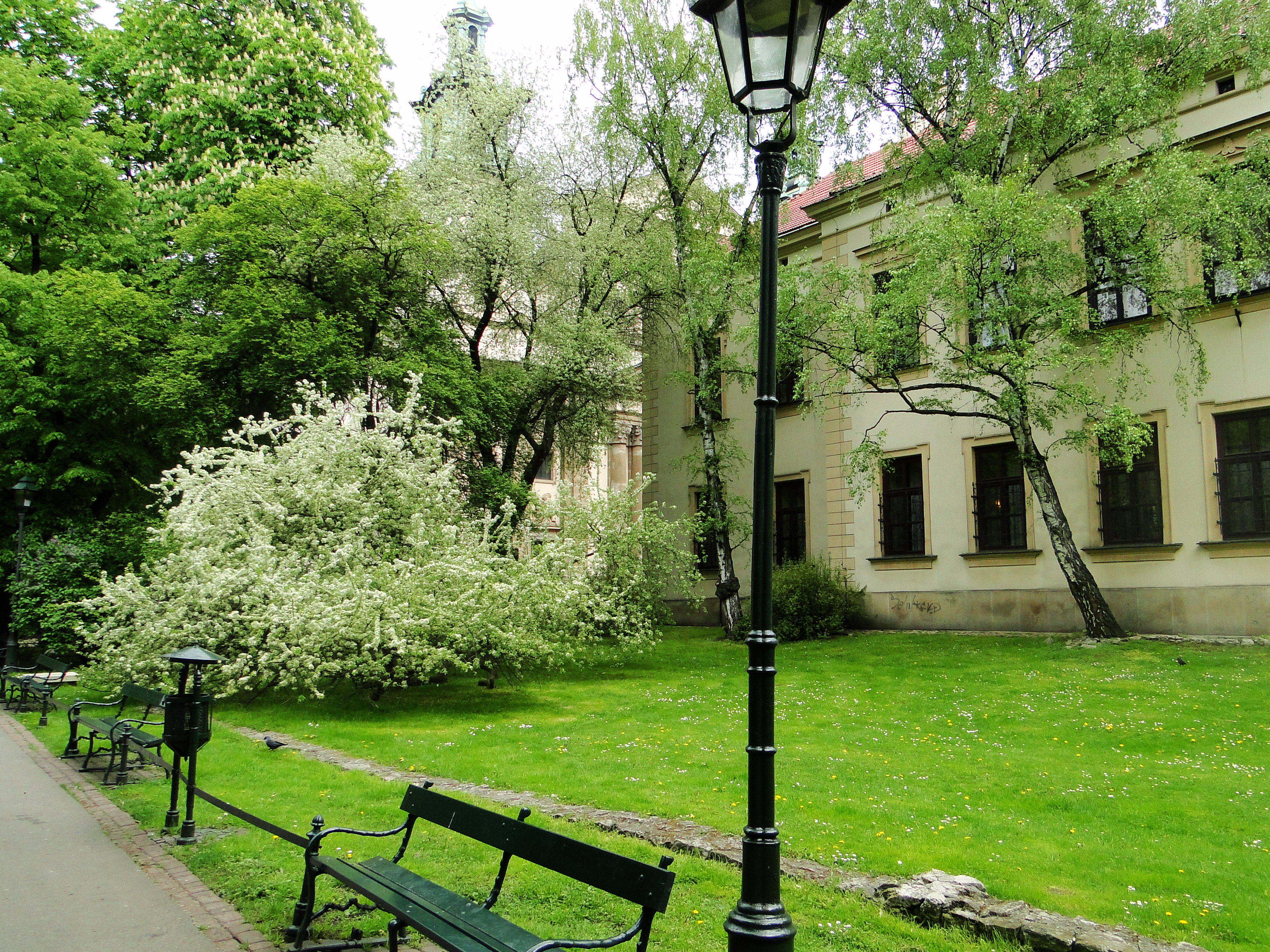 Planty Krakowskie